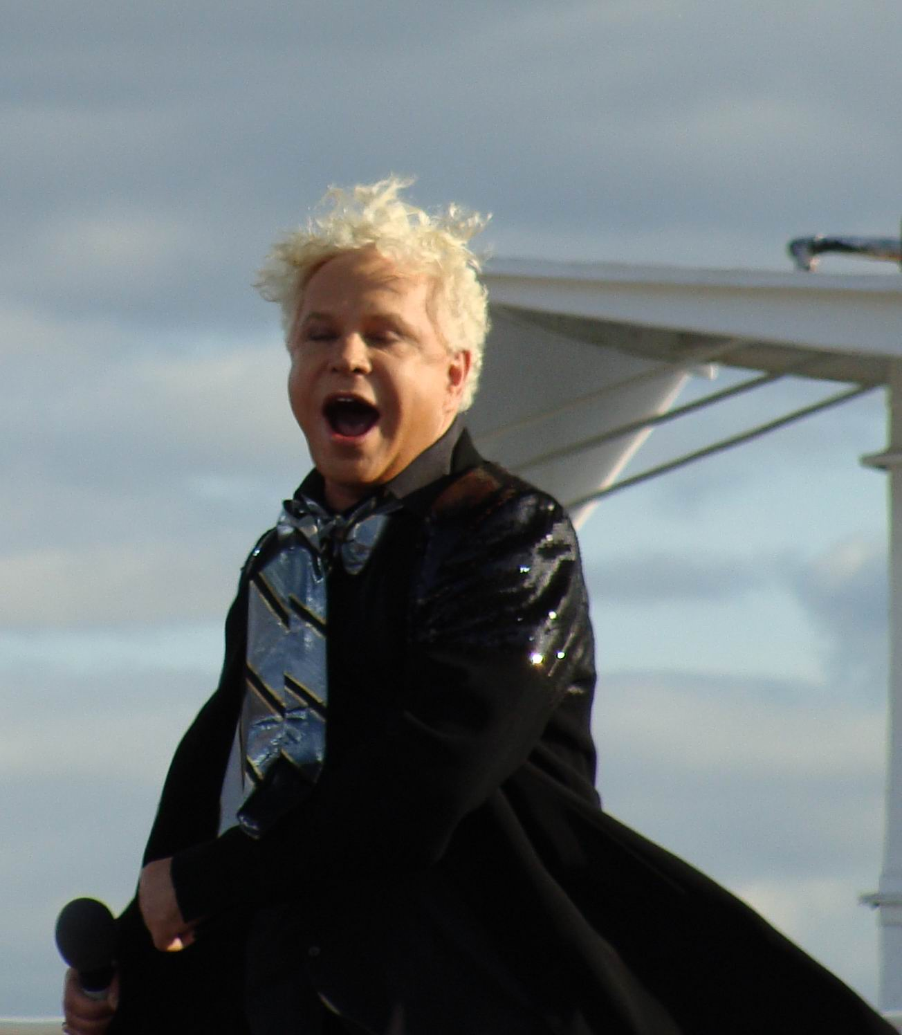 Моисеев Борис Михайлович в Архангельске выступает совместно с программой Регины Дубовицкой - "Аншлаг" на юбилее, 425-летии города, в воскресенье, летом 28 июня 2009 года.